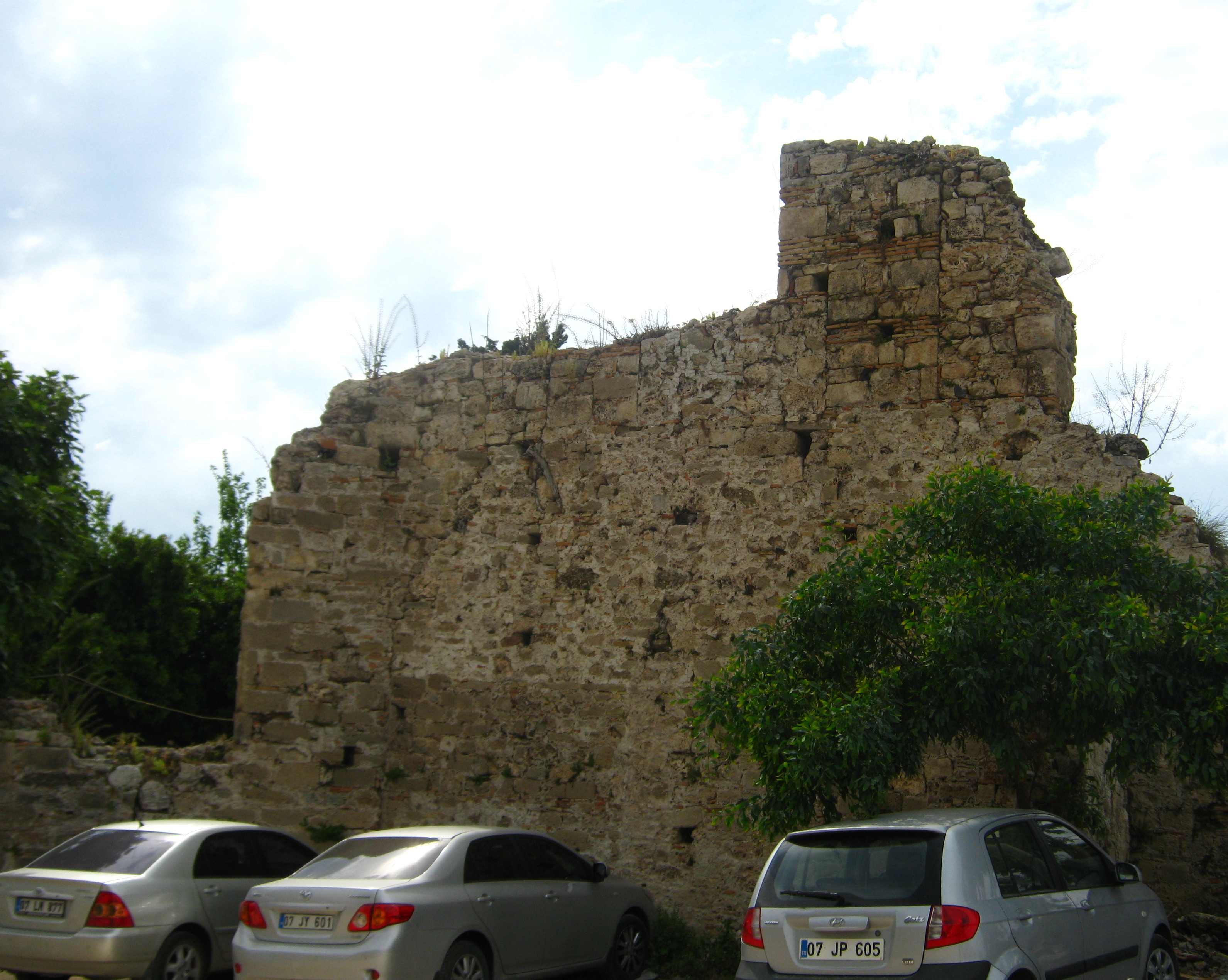 Залишки східної стіни Базиліки "Б"